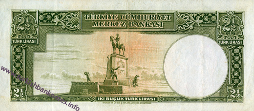 E2 serisi 2 Buçuk Türk Lirasının arka yüzü.